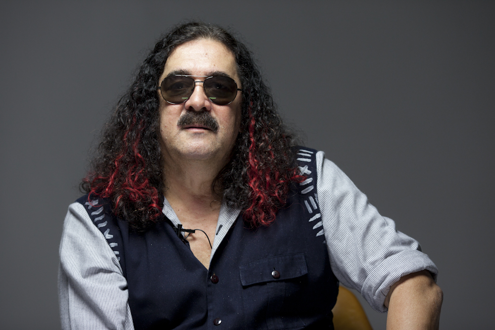 Foto tirada em 26/06/2010 pelo Garapa - Coletivo Multimídia ( Moraes Moreira em entrevista ao projeto Produção Cultural no Brasil: Moraes Moreira é músico e foi integrante do conjunto musical Novos Baianos.